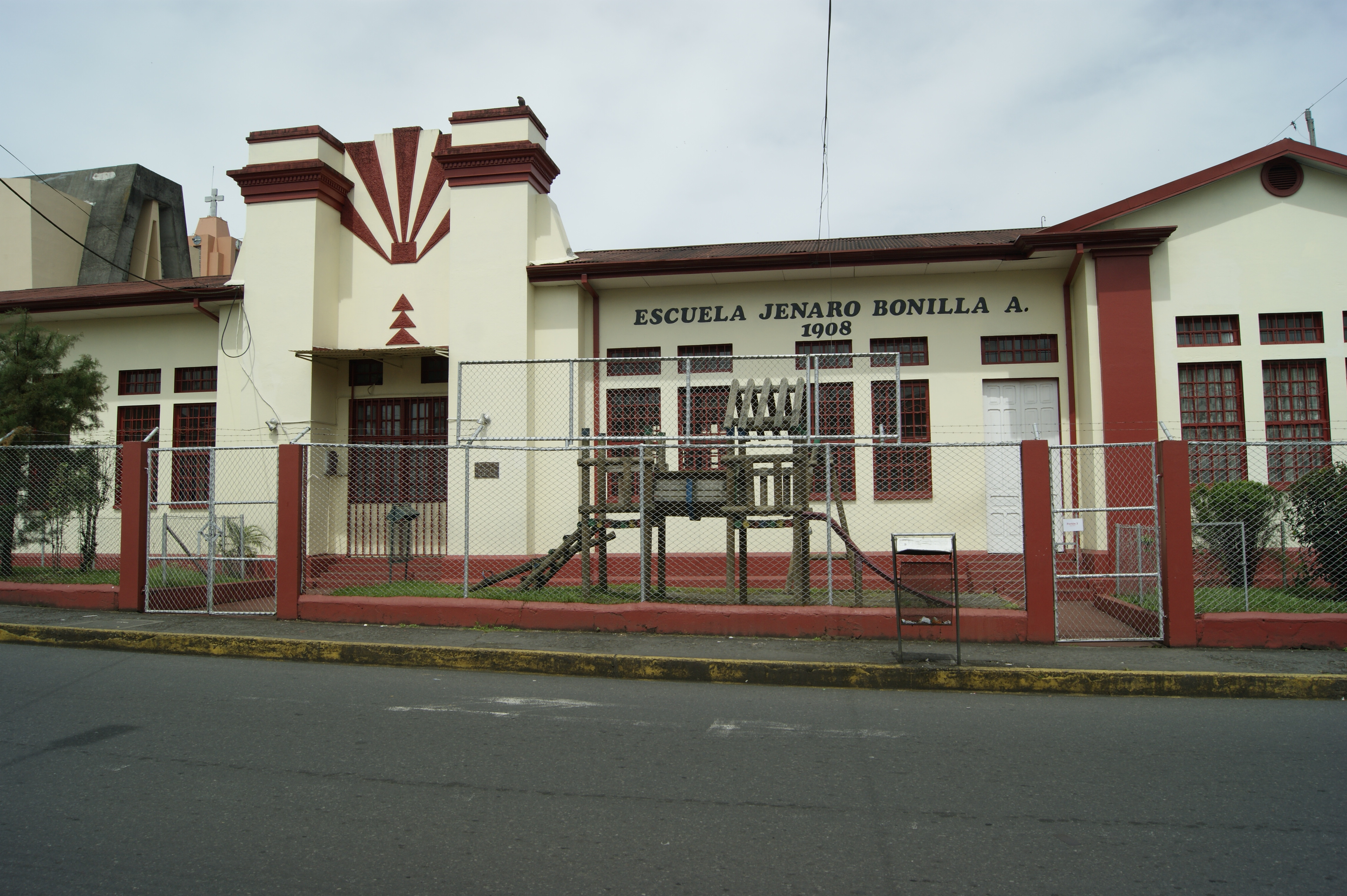 La escuela más antigua de Turrialba fundada en el año de 1908, anteriormente llamada escuela John D. Rockefeller.